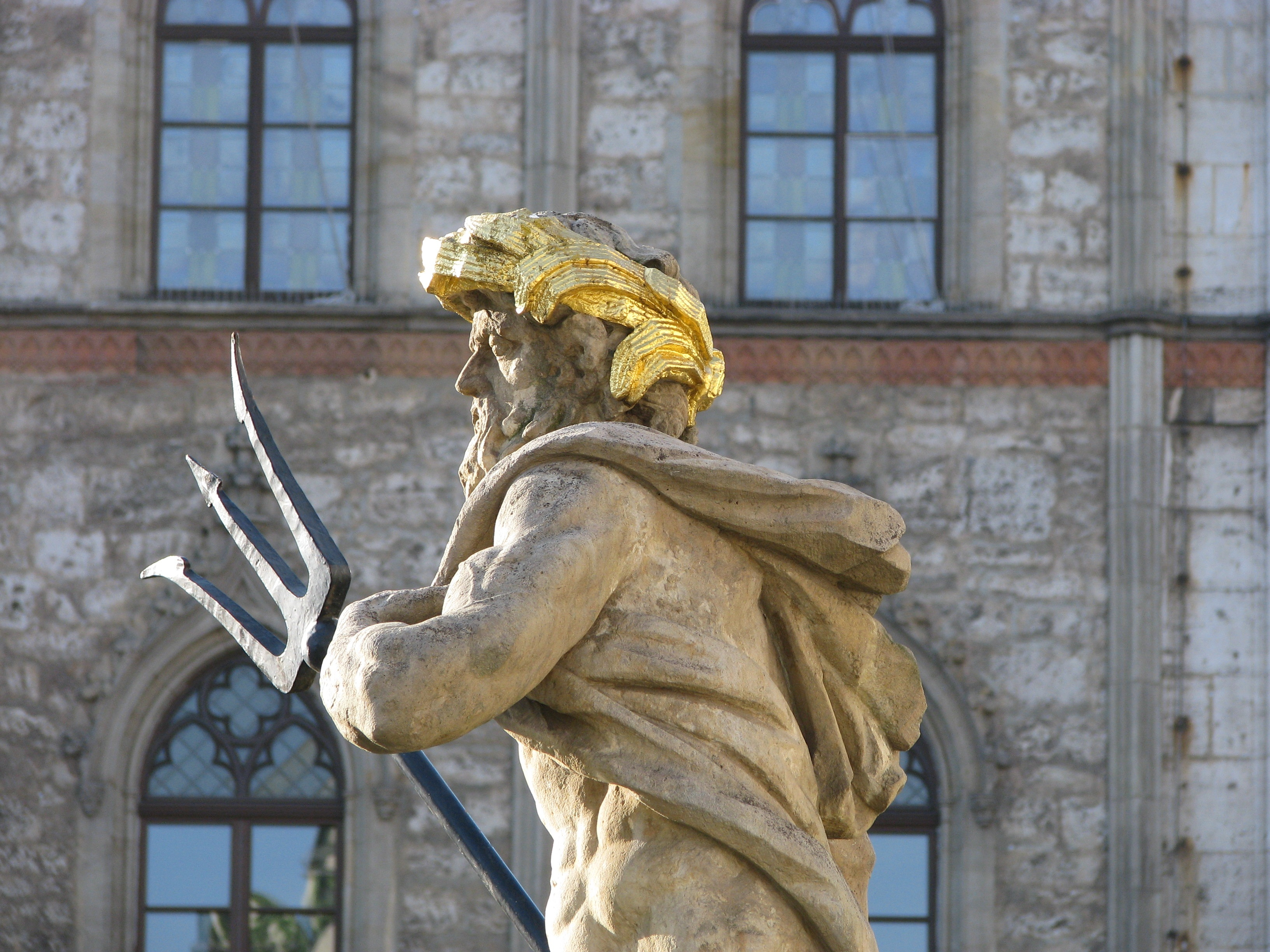 Neptun vor dem Weimarer Rathaus